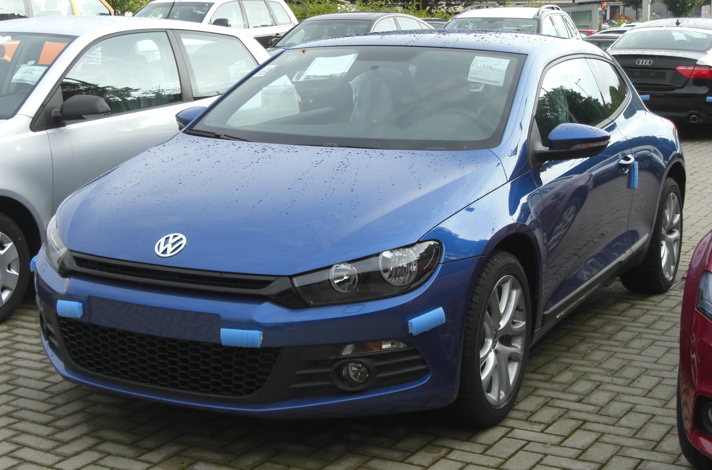 VW Scirocco